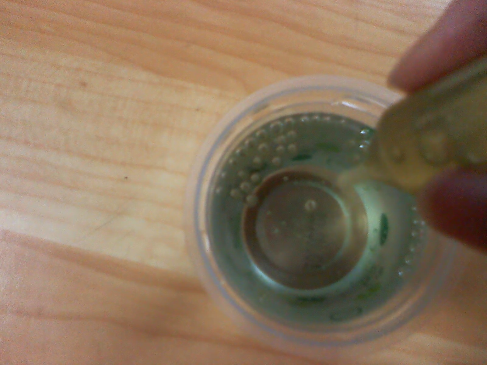 마시는 구슬젤리의 만드는 과정. 스프를 물에 탄 뒤에 젤리 튜브를 한 방울씩 짜면 된다.